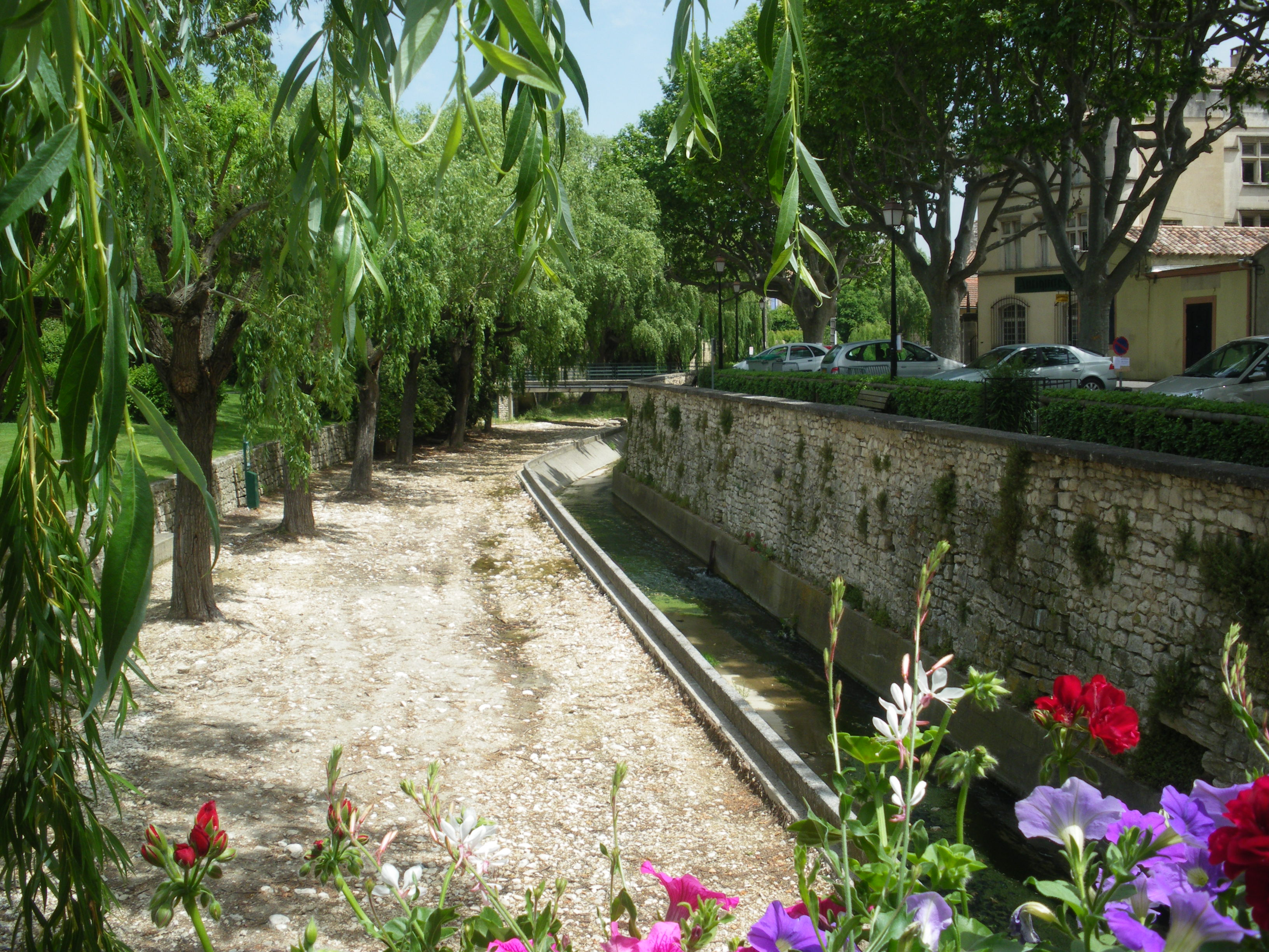 Rivère la Nesque à Pernes les Fontaines